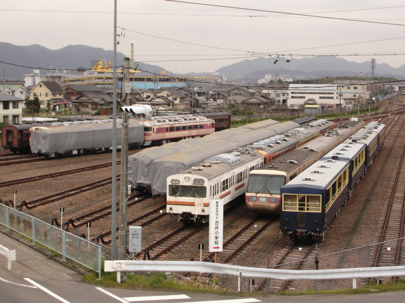 JR東海 美濃太田車両区（一部）